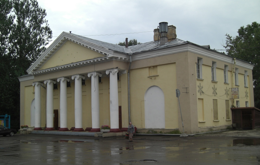 Дом культуры в Коммунаре (Ленинградская область)